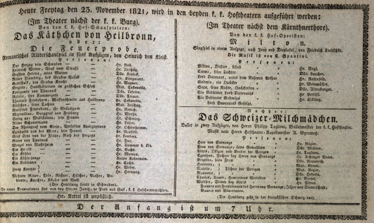 Theaterzettel der Hoftheater Wien vom 23. November 1821